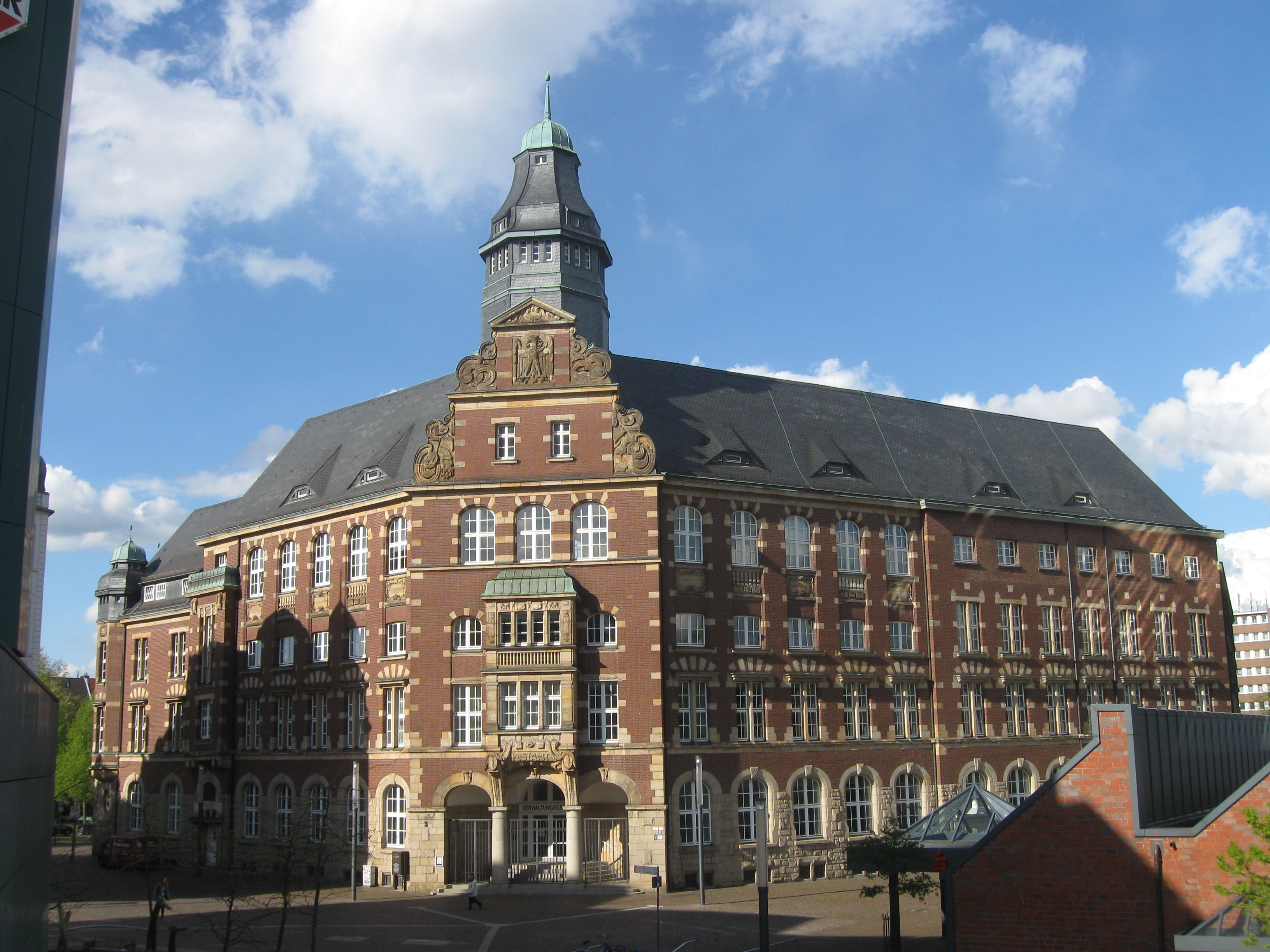 Ehemalige Hauptpost von Gelsenkirchen, heutiges Amtsgebäude des Verwaltungsgerichts (Bahnhofsvorplatz 3, gegenüber dem Gelsenkirchener Hauptbahnhof). Erbaut 1908–1910.